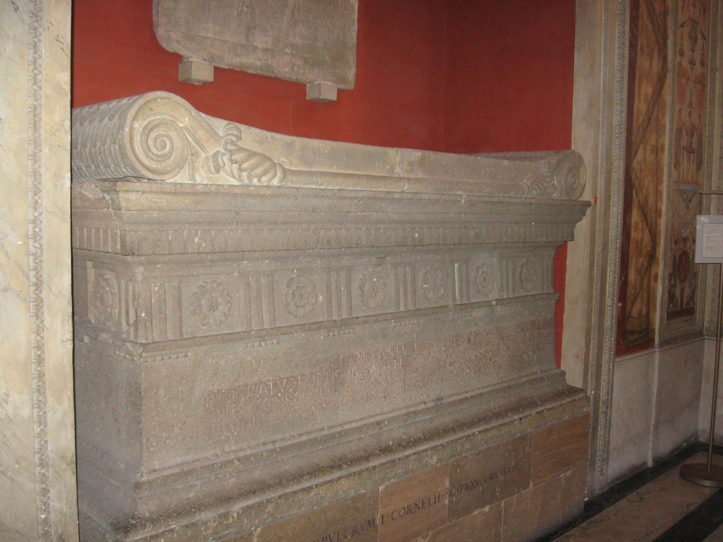 Sarkophag von Lucius Cornelius Scipio Barbatus, Museo Pio-Clementio im Vatikan, Vestibolo Quadrato (Raum 13) - Von links.